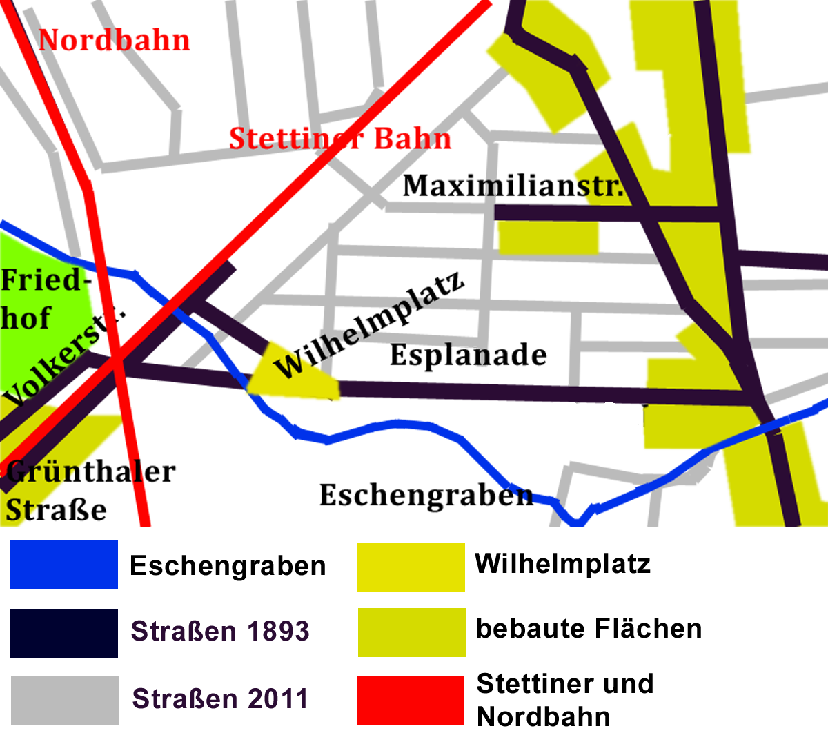 Die Lage des Wilhelmplatzes in Berlin Pankow um 1890. Gezeichnet nach der Beilage zum Berliner Adressbuch von 1893. Plan von Berlin mit sämtlichen Vororten und vollständiger Stadt- und Ringbahn bearbeitet und herausgegeben von Julius Straube. Geographisches Institut und Landkartenverlag, Julius Straube, Berlin SW, Gitschinerstraße 109. Die hinterlegten Straßen in grau geben die Lage der Straßen im Tiroler Viertel von Pankow und dem angrenzenden Gebiet wieder (ungefähre Lage nach dem Berliner Stadtplan)e. Rot: Stettiner und Nordbahn. Blau: Eschengraben. Grün: Friedhof der Sophiengemeinde. Das damals bereits bebaute Gelände ist in grüngelb dargestellt. ANzumerken, die Maximilianstraße geht nur im Beginn der heutigen Maximilianstraße in das unbebaute Gelände hinein. Westlich der Bahnstrecken ist entlang der Volkerstraße und der Grünthaler Straße (im heutigen Gesundbrunnen) das Gelände bereits bebaut.